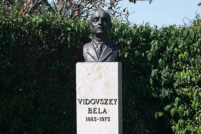 Vidovszky Béla festőművész szobra a Vidovszky Béla Helytörténeti Gyűjtemény (Városi Képtár) parkjában található (5500 Gyomaendrőd, Kossuth út 11.).